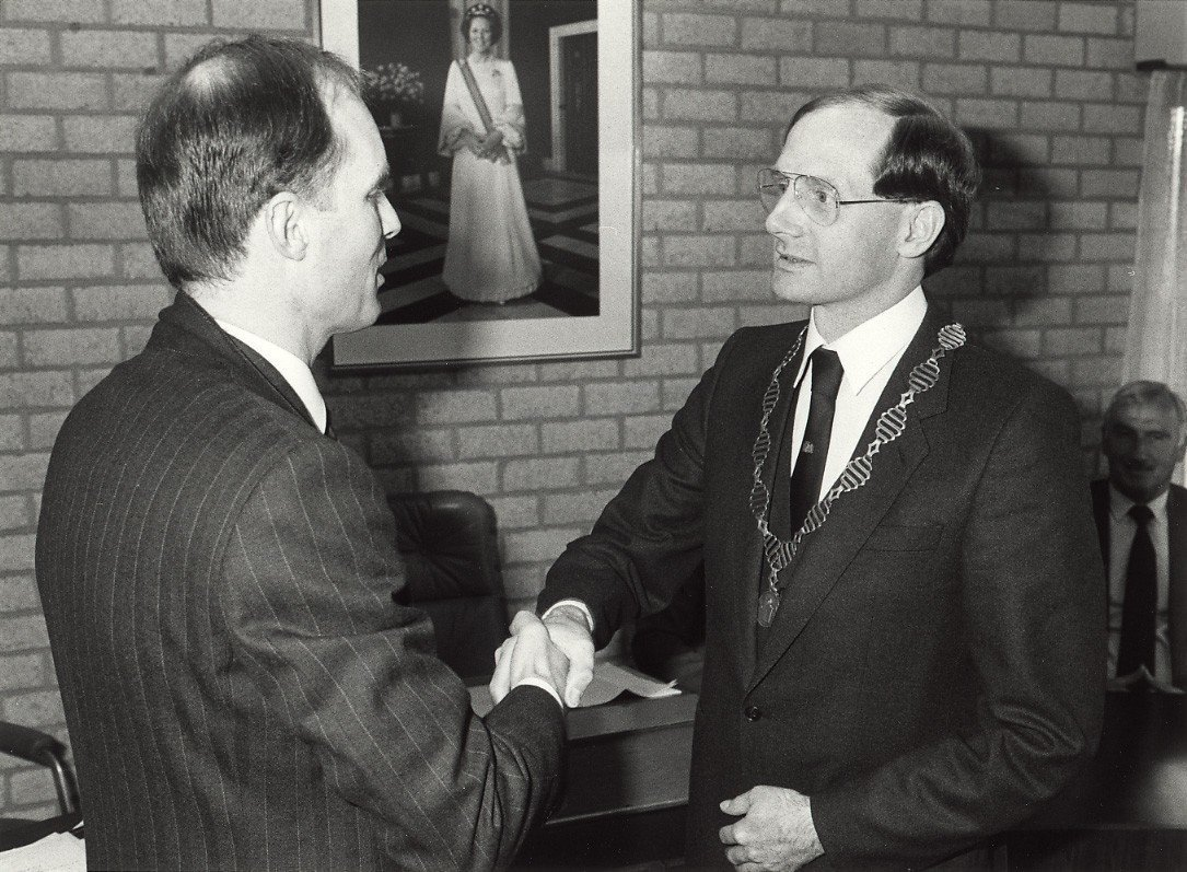 CollectieCollectie Fotoburo de BoerInventarisnummerNL-HlmNHA_54016688Beschrijving[Installatie van G.H. van Egerschot tot burgemeester van Bennebroek door de loco-burgemeester K.B.F.M. Zwetsloot] [afbeelding] / [door] Fotopersbureau C. de Boer. - Haarlem : de Boer, 1984. - 1 fotoFotonummerKNA006012034DocumenttypeHistorieprenten, tekeningen en foto'sVervaardigerBoer, Cees de (1918-1985) Soort vervaardigerFotograaf Interieur/ExterieurInterieurAnnotaties54/55-002 691LandNederland ProvincieNoord-Holland GemeenteBennebroek Begindatum1984Einddatum1984TechniekFoto CopyrighthouderNoord-Hollands Archief